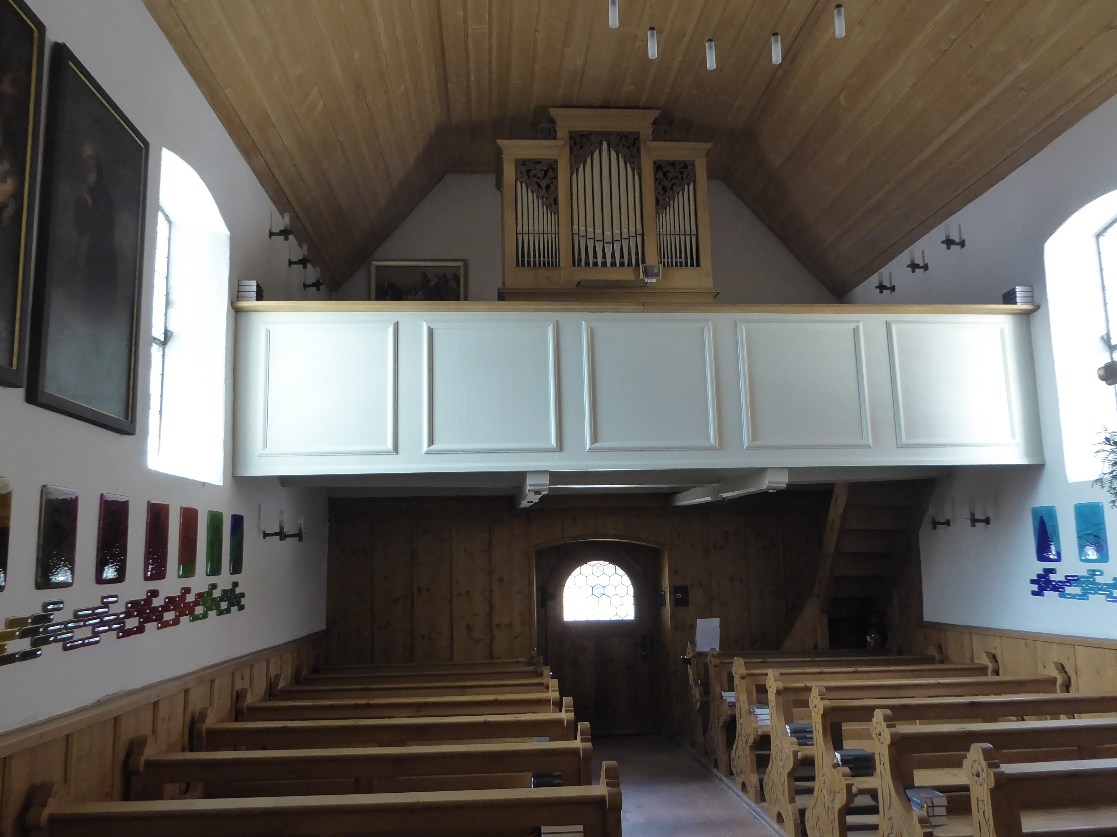 Kapelle Planken FL: Empore